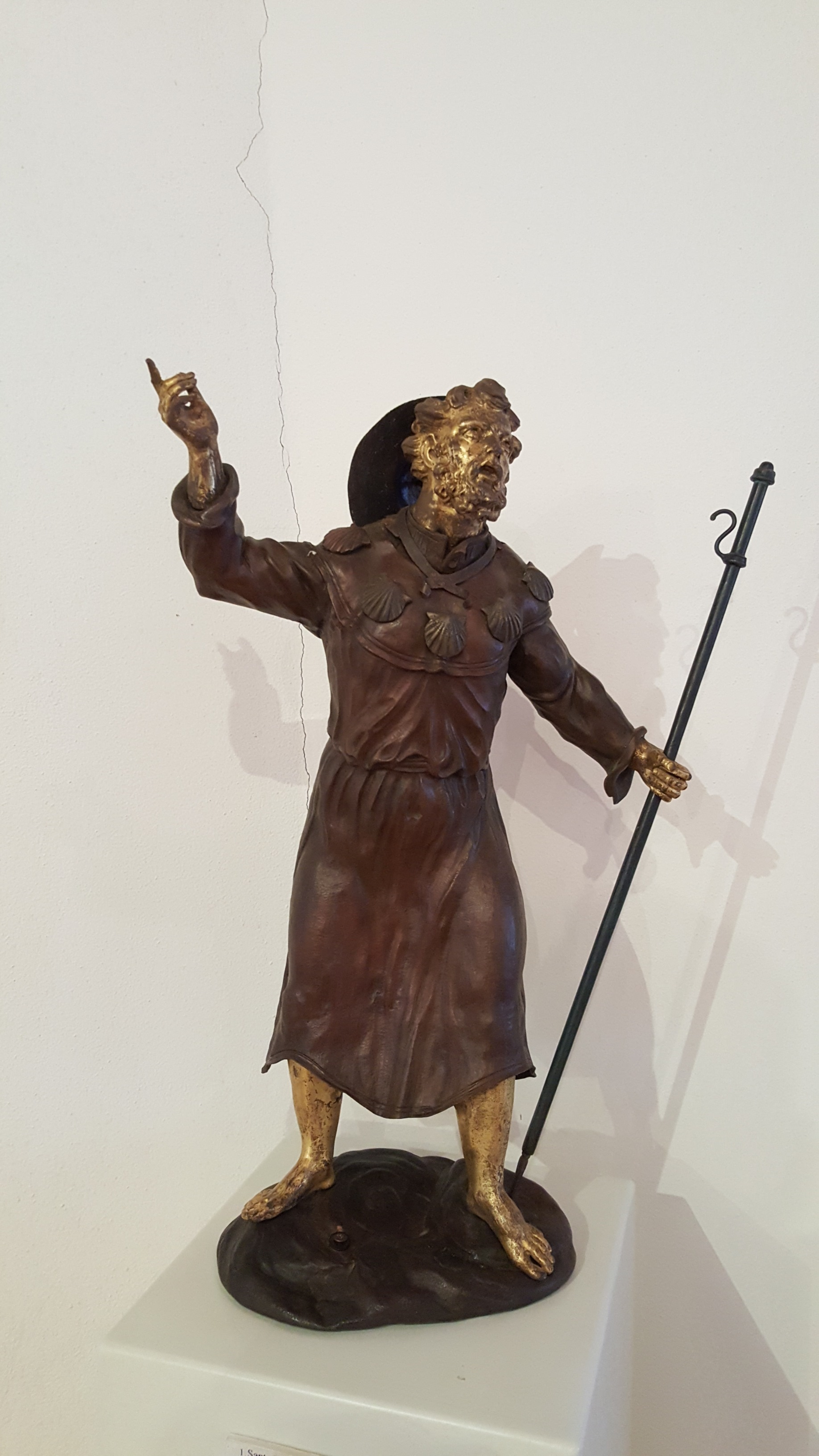 Museo di Saludecio e del Beato Amato This is a photo of a monument which is part of cultural heritage of Italy.